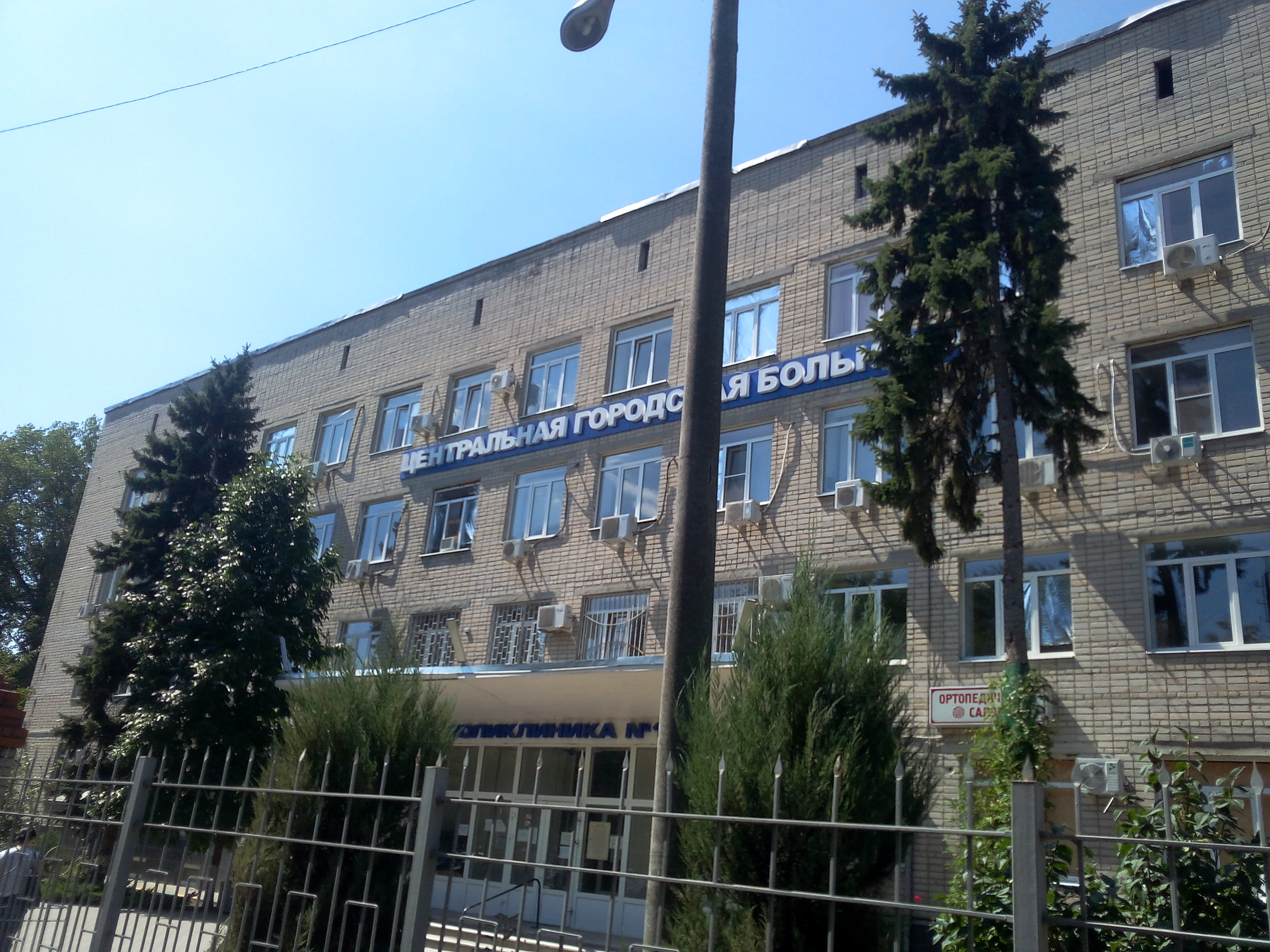 здание Центральной городской больницы г. Батайска